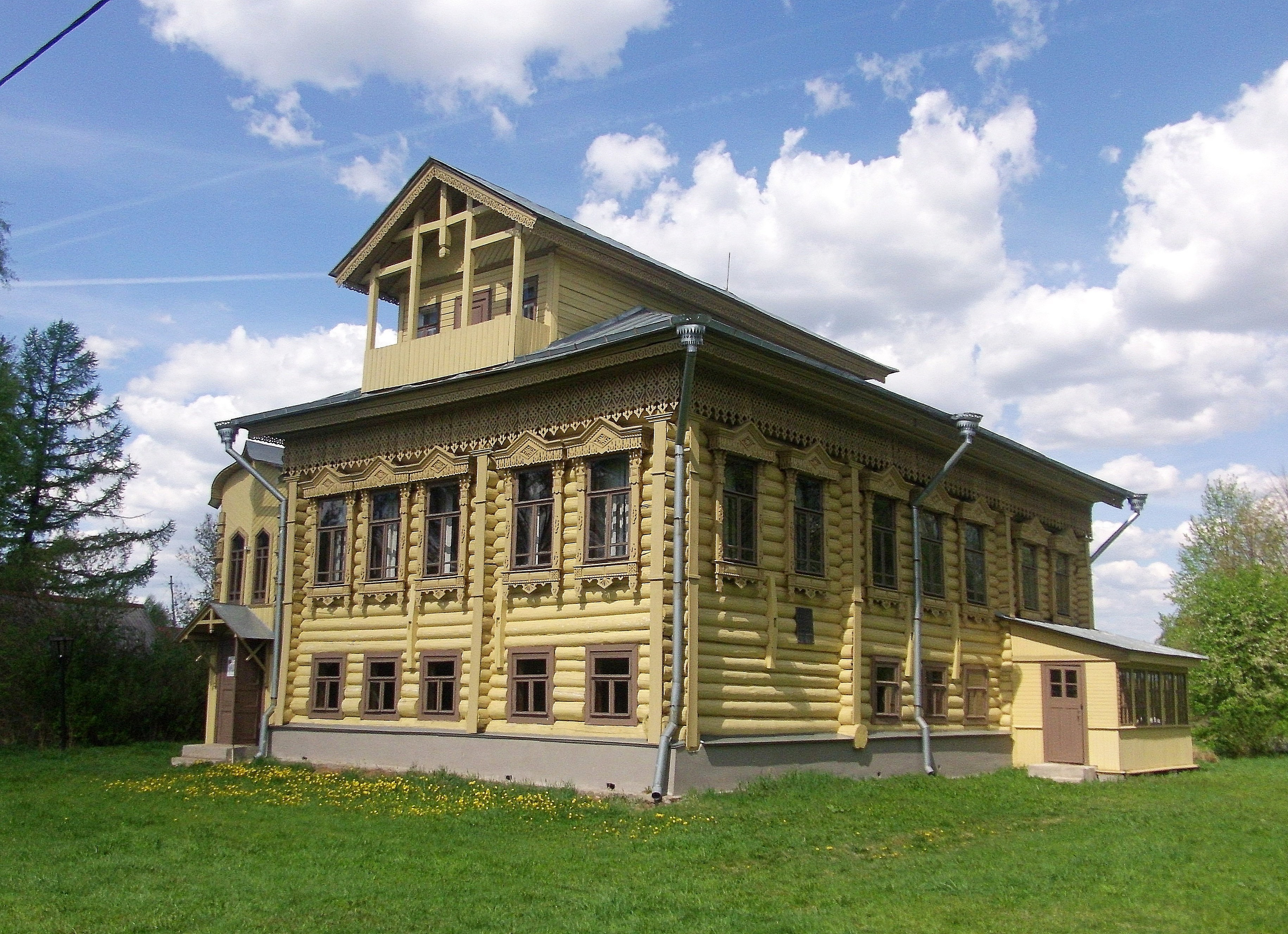 Филиал музея в селе Рыбницы Некрасовского района